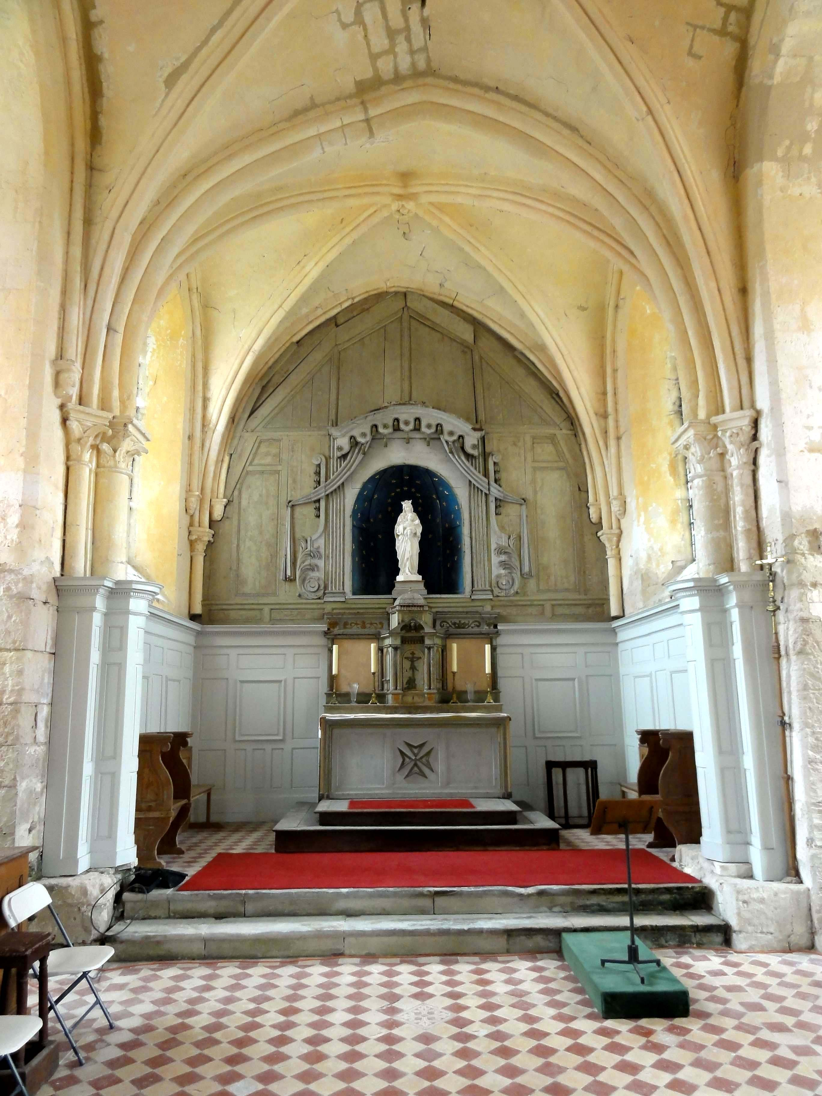 Intérieur de l'église (voir titre).